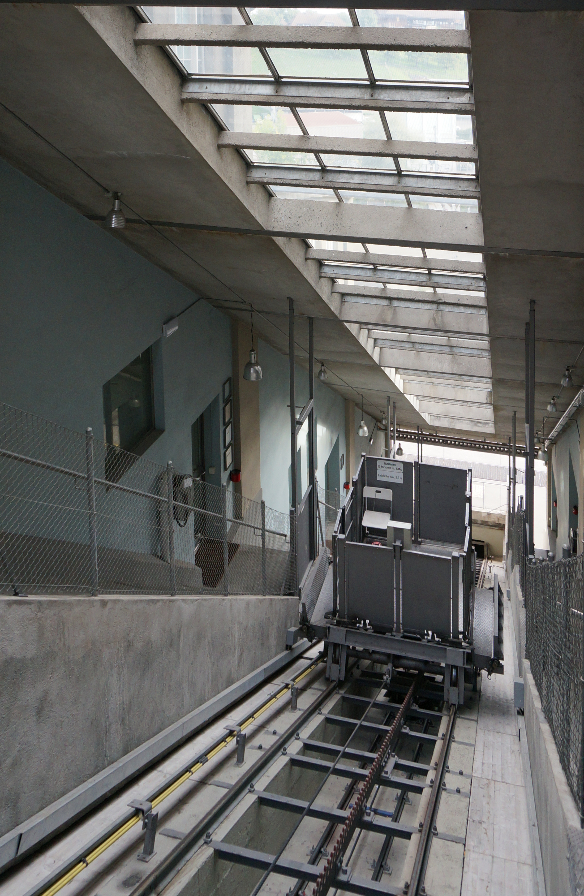 Stufenbau (ehemalige Nitrozellulosefabrik), Zahnradbahn